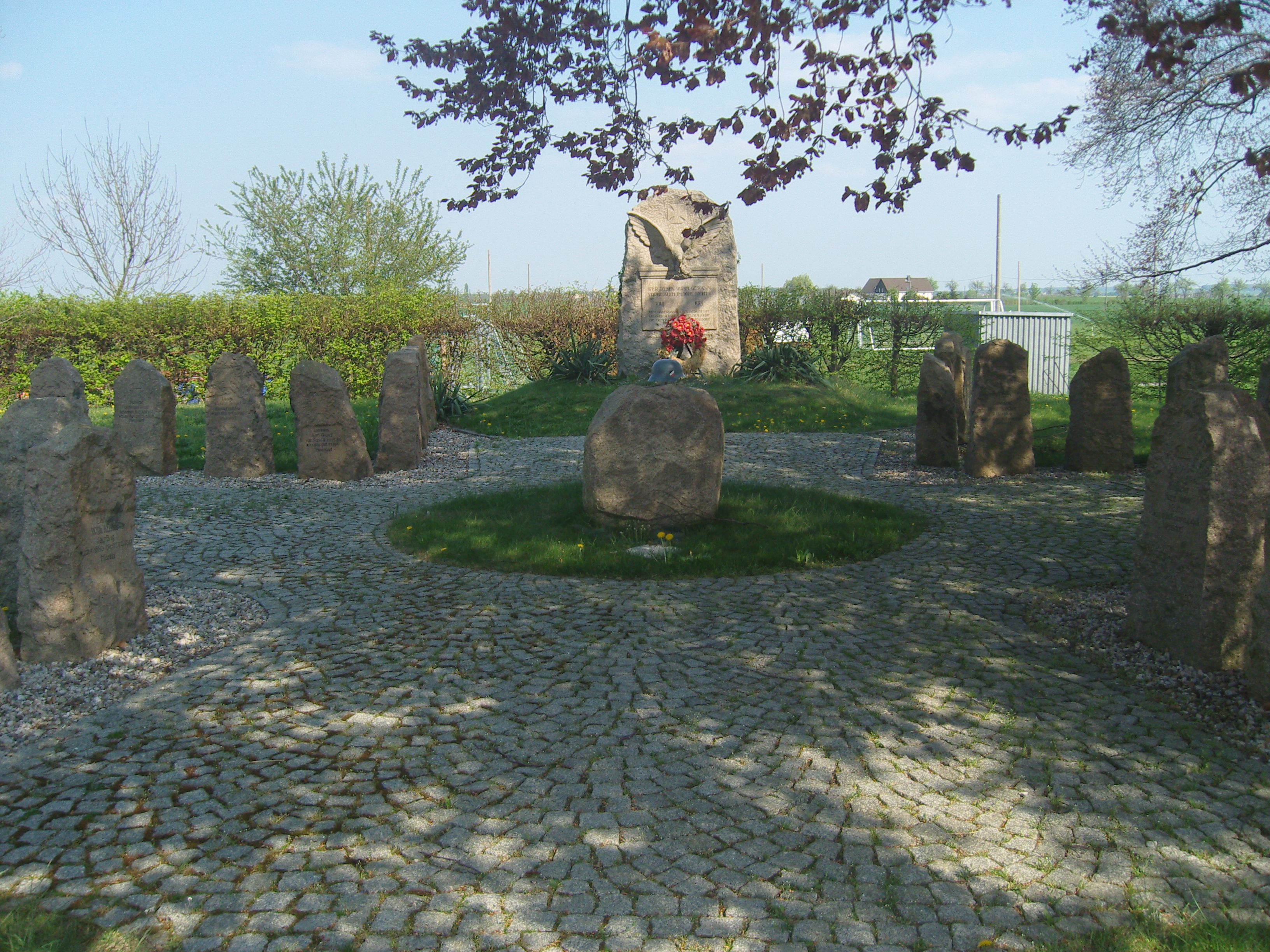 Kriegerdenkmal für die Gefallenen des Ersten Weltkriegs in Mörtitz